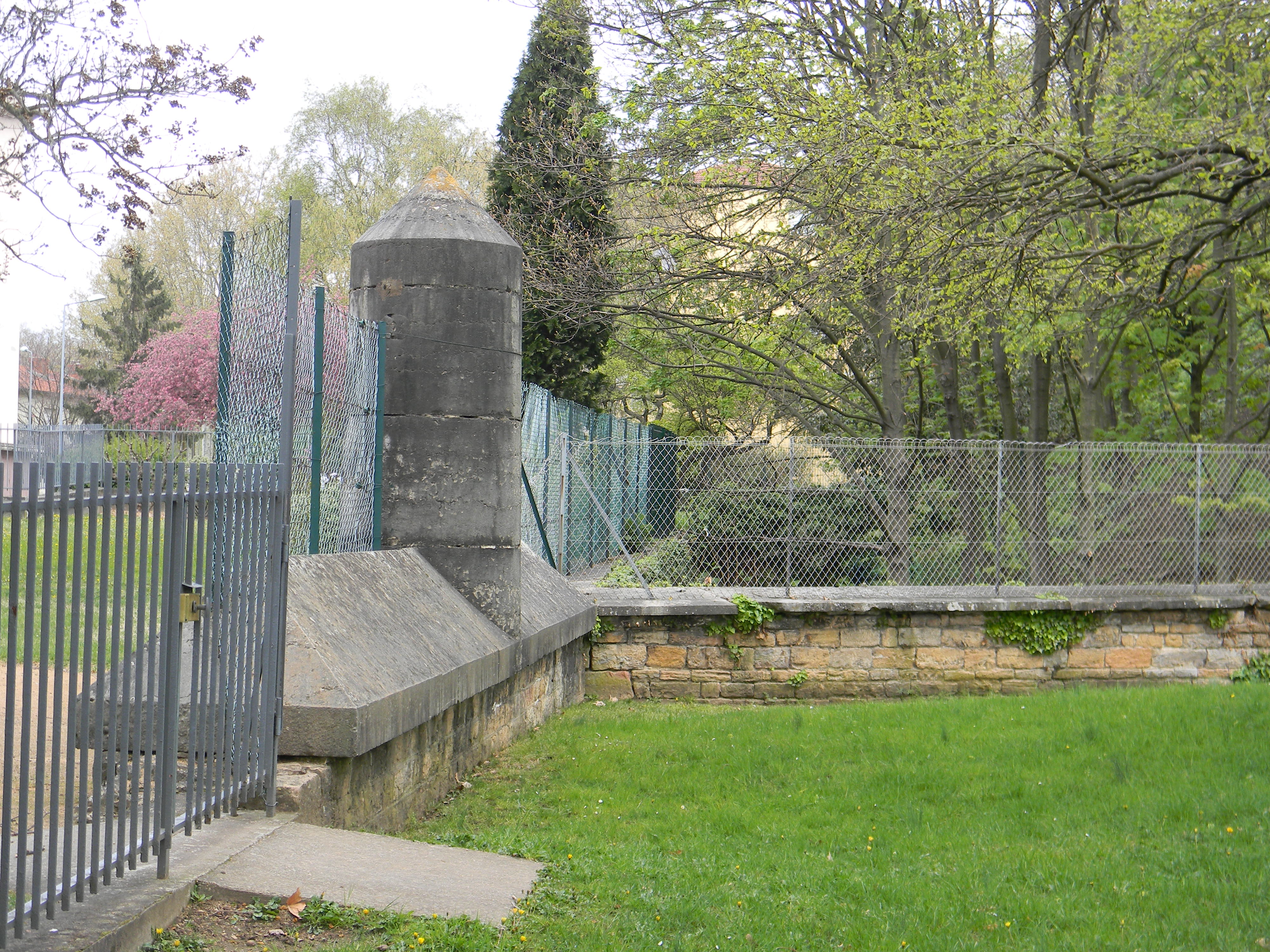 Une « dame » sur l'ancien mur d'escarpe du fort de Montessuy, élément de fortification interdisant le passage sur l'enceinte.